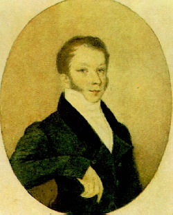 Одоевский Владимир Феодорович (В.А. Тропинин, акварель, 1831)